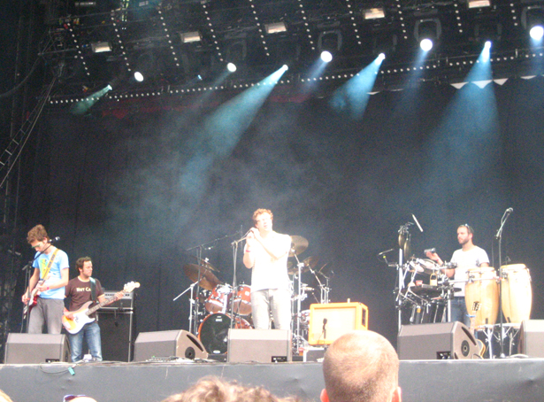 Gomez (band) at Pukkelpop 2006